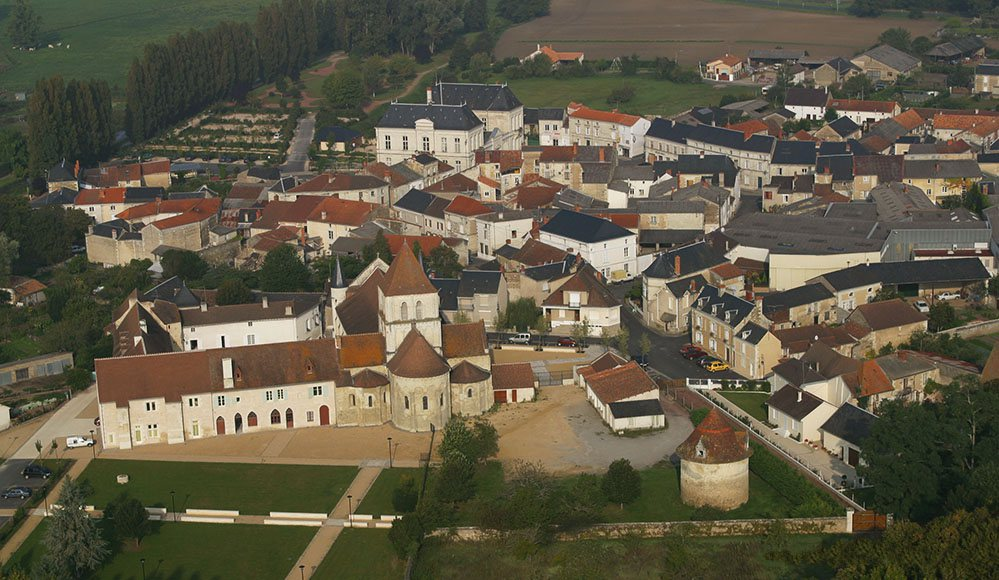 Vue Est de Lencloître